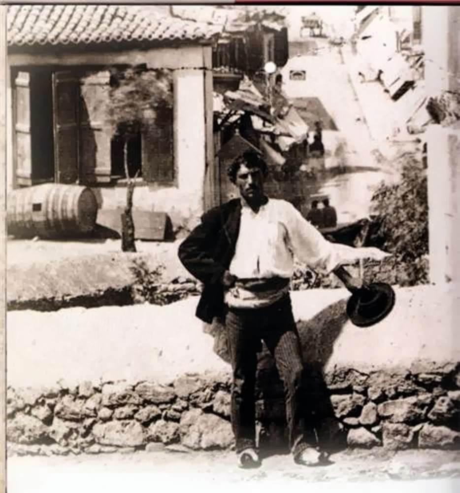 Κουτσαβάκης ξαποσταίνει δίπλα στον Πύργο των Αέρηδων. Ίσως η μόνη σωζόμενη φωτογραφία κουτσαβάκη, προέρχεται από τμήμα φωτογραφίας του Πύργου των Αέρηδων από το 1880.